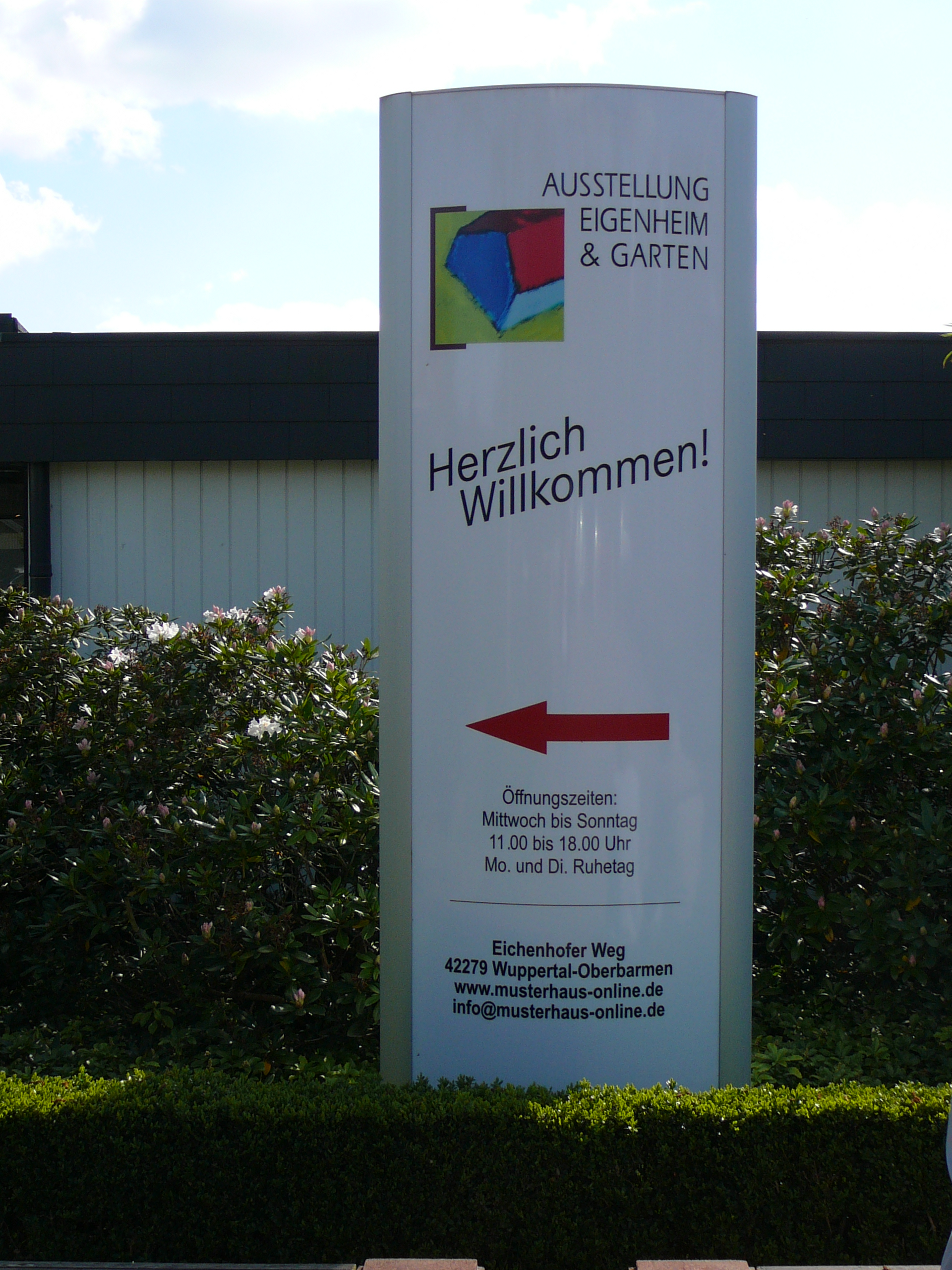 Eichenhofer Weg, Wuppertal